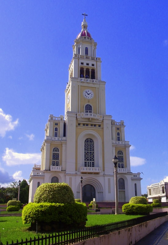 Moca Dominican rep.